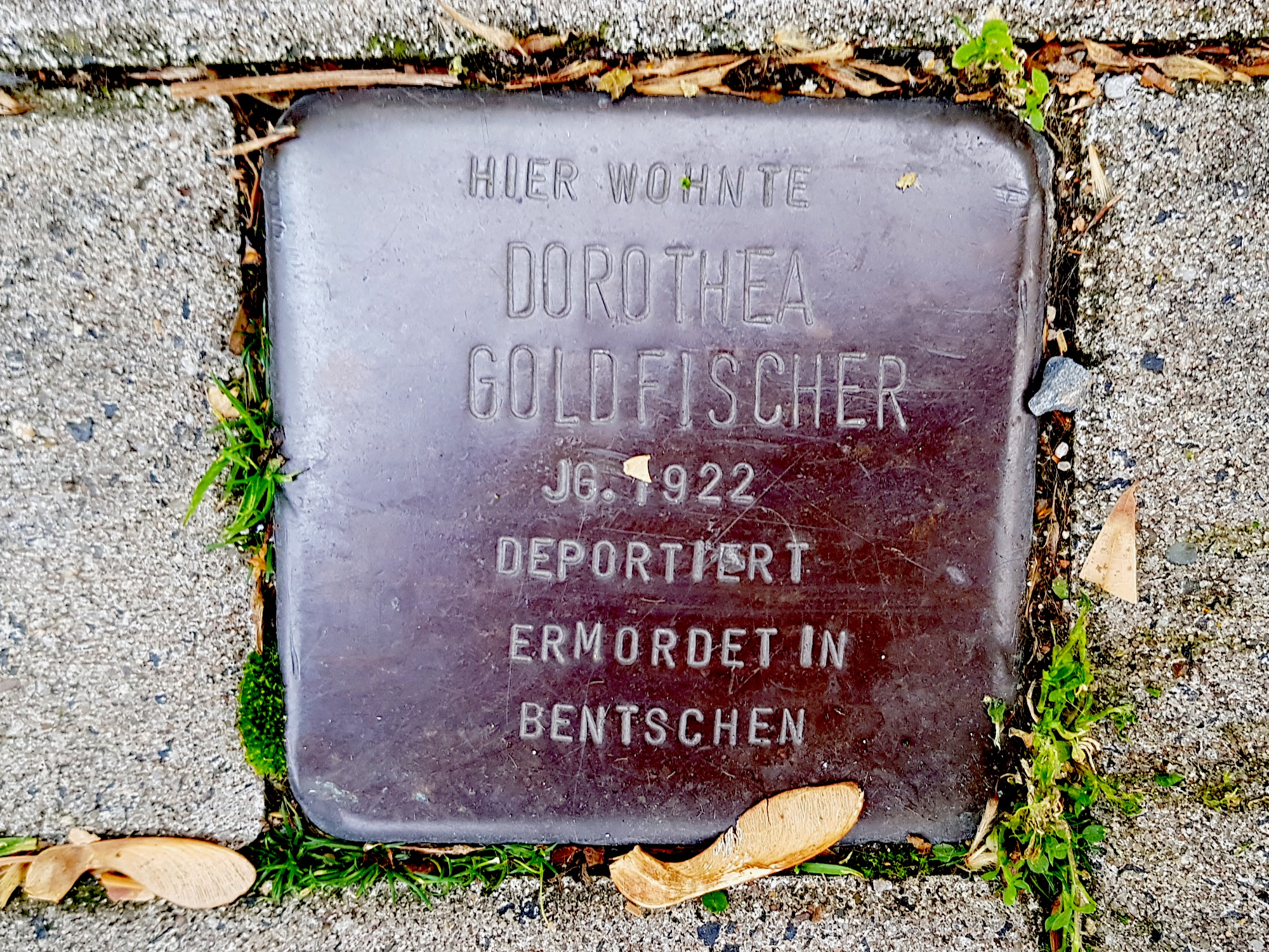 Stolperstein für Dorothea Goldfischer in der Pappenstr. 3, Duisburg-Neudorf, Jg. 1922, deportiert, ermordet in Bentschen